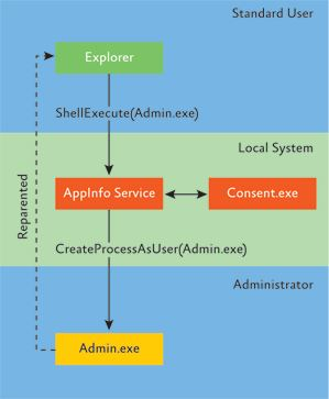 UAC elevation process